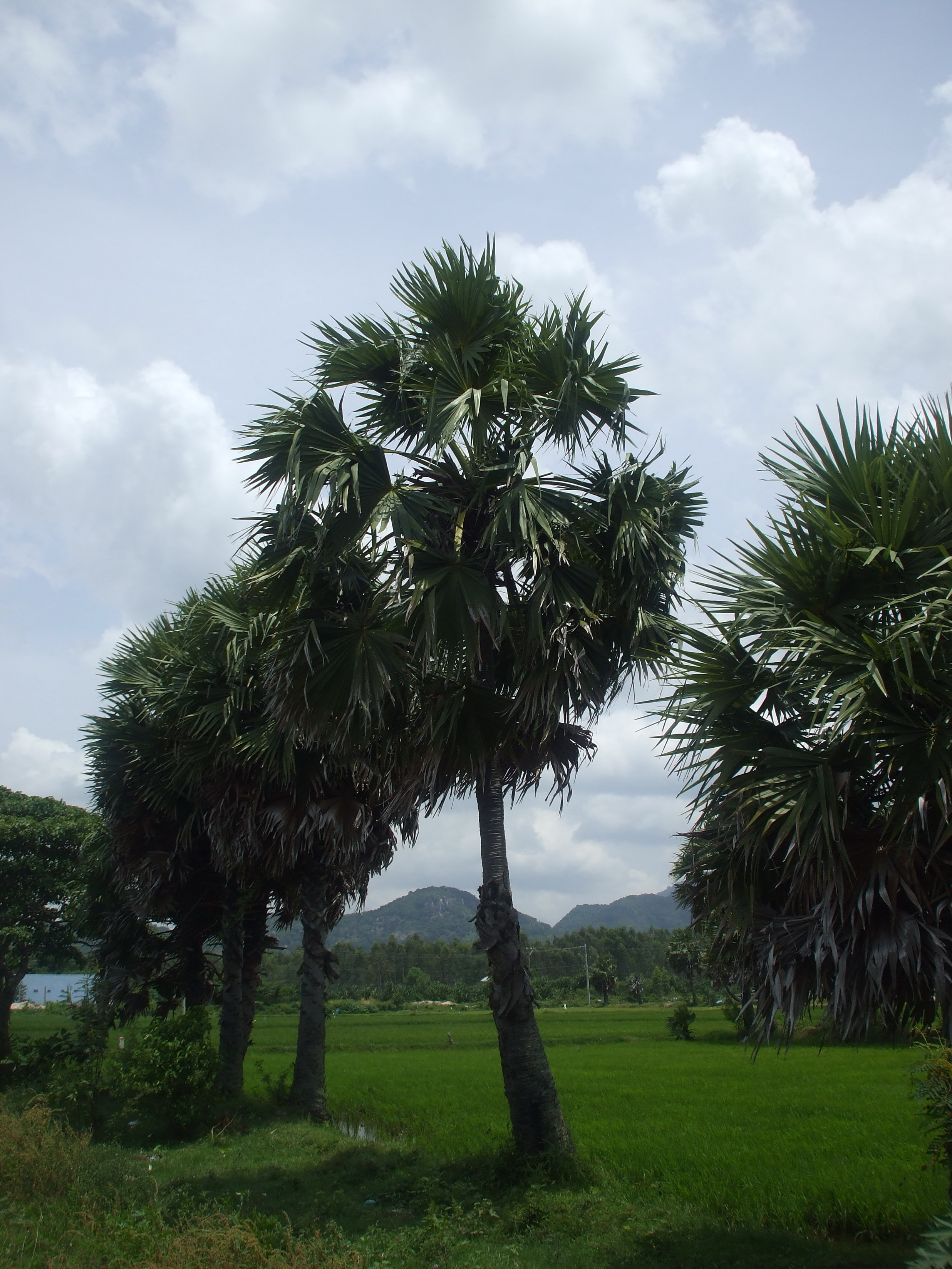 Núi Dài Năm Giếng, huyện Tịnh Biên, tỉnh An Giang.